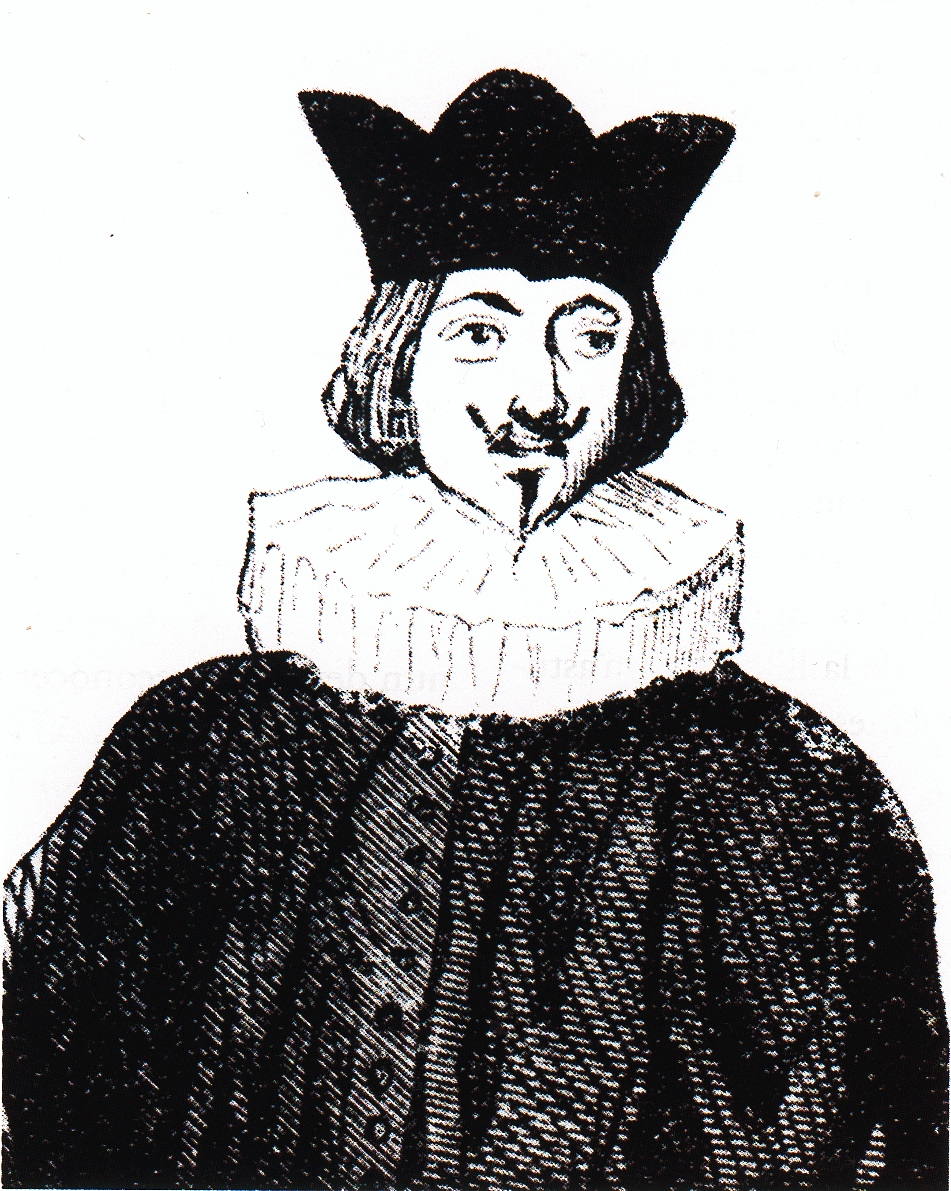 Antón de Marirreguera, 19th century ideal portrait.